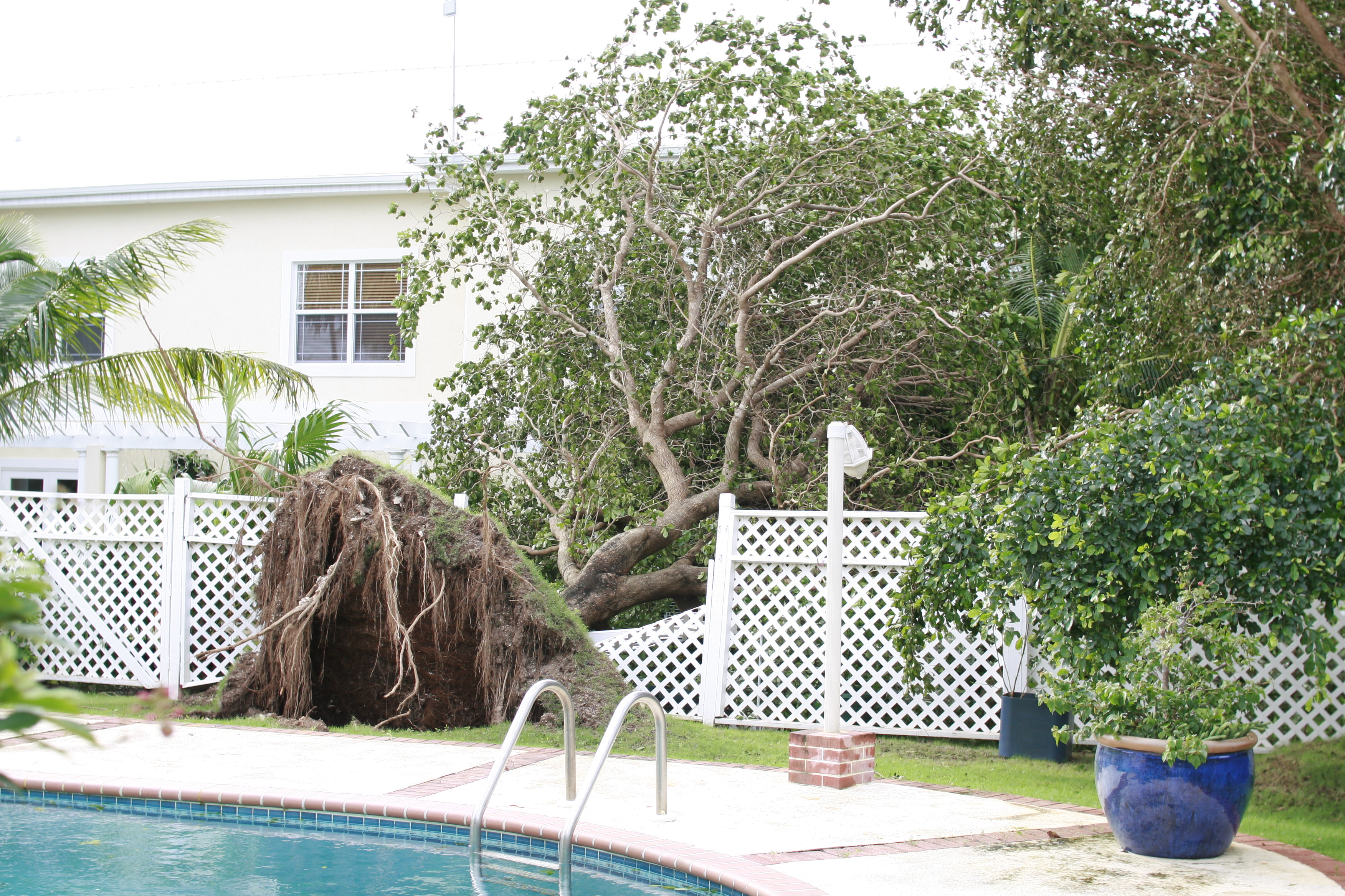 _MG_3847